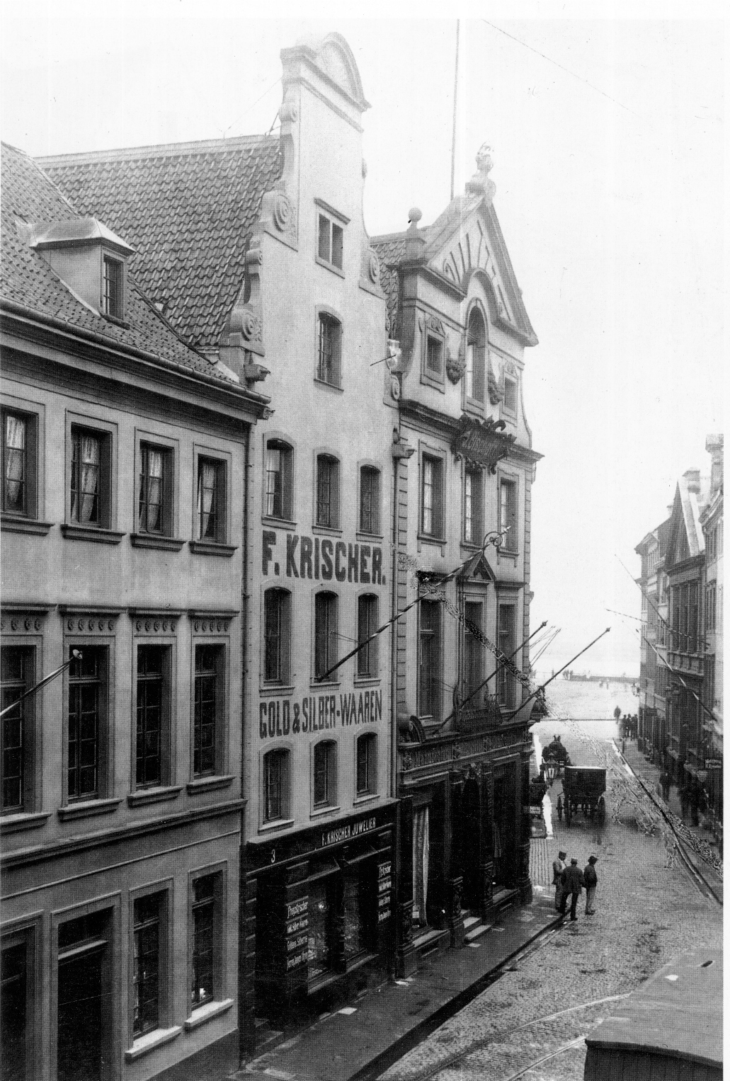 Flinger Straße 5, 3, 1 (von links nach rechts); Nr. 5 und 3 sind nicht mehr existent. An der Flinger Straße 1 befindet sich das Haus Goldener Helm aus dem 18. Jahrhundert.